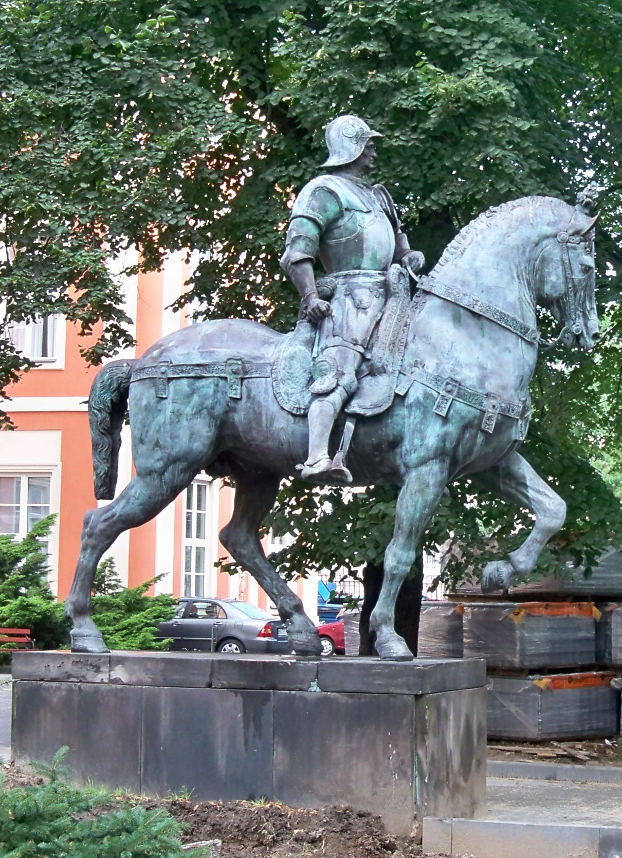 Kopia pomnika Bartolomea Colleoniego z Wenecji na dziedzińcu ASP w Warszawie